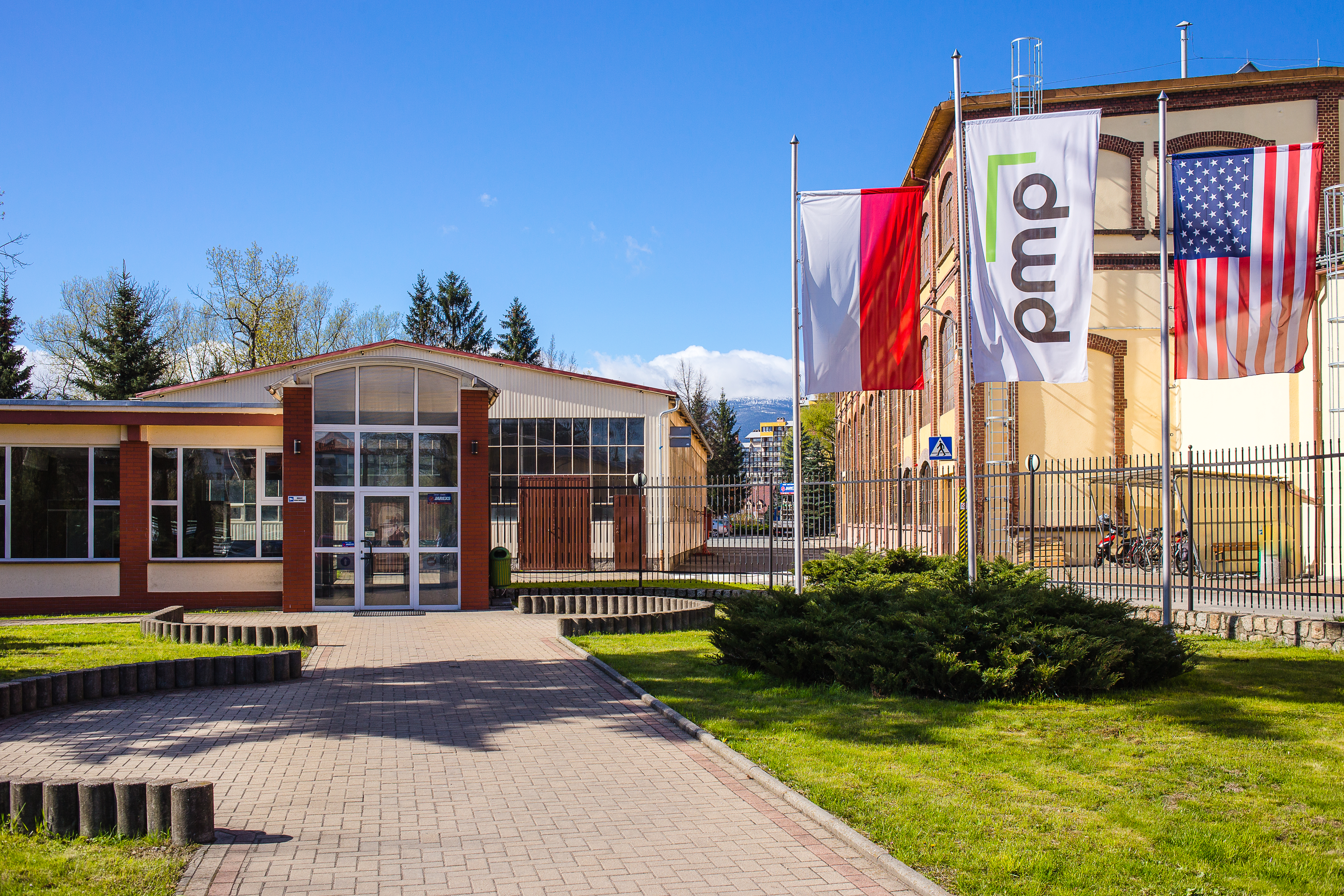 Siedziba główna PMP w Jeleniej Górze